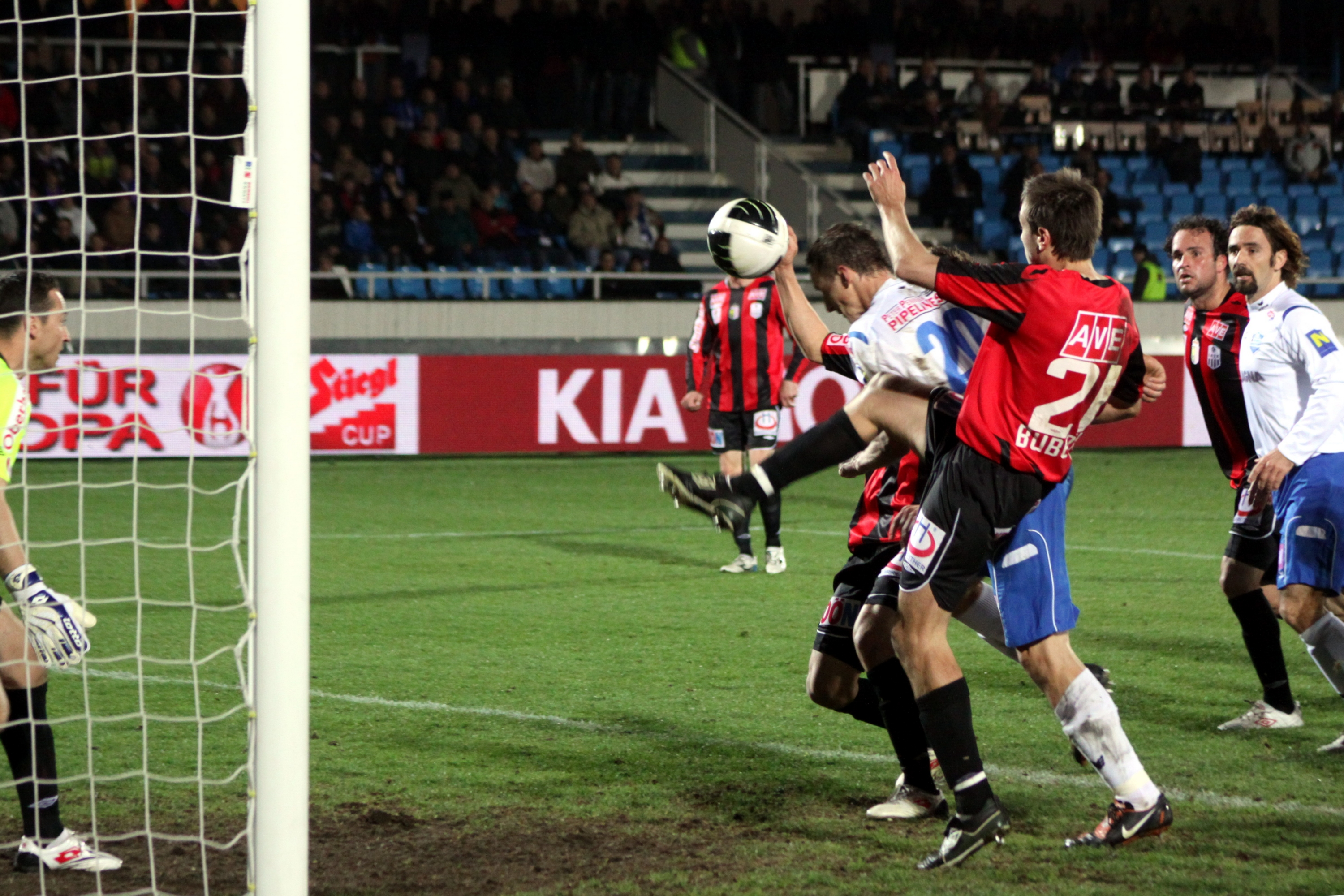 Österreichischer Fußball-Cup 2009/10: SC Magna Wiener Neustadt gegen LASK Linz (2:1) – Johannes Aigner erzielt den Treffer zum Ausgleich in der 93. Spielminute. Wolfgang Bubenik (im Vordergrund) kommt zu spät.